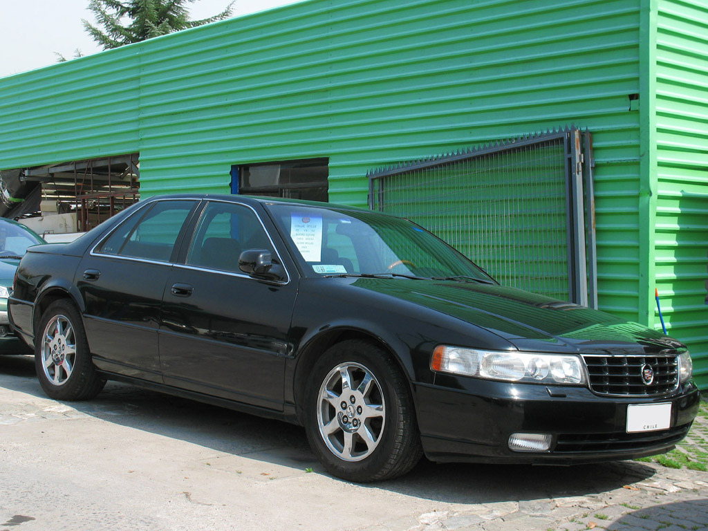 Cadillac Seville STS 2003